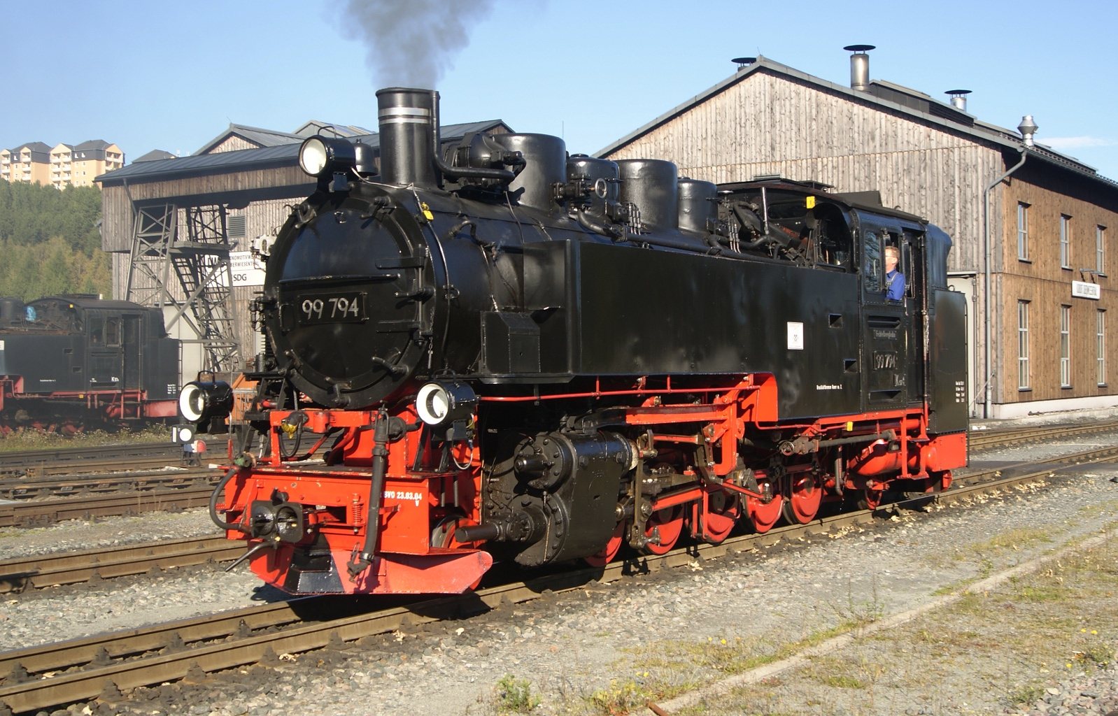 99 794 im Bahnhof Oberwiesenthal